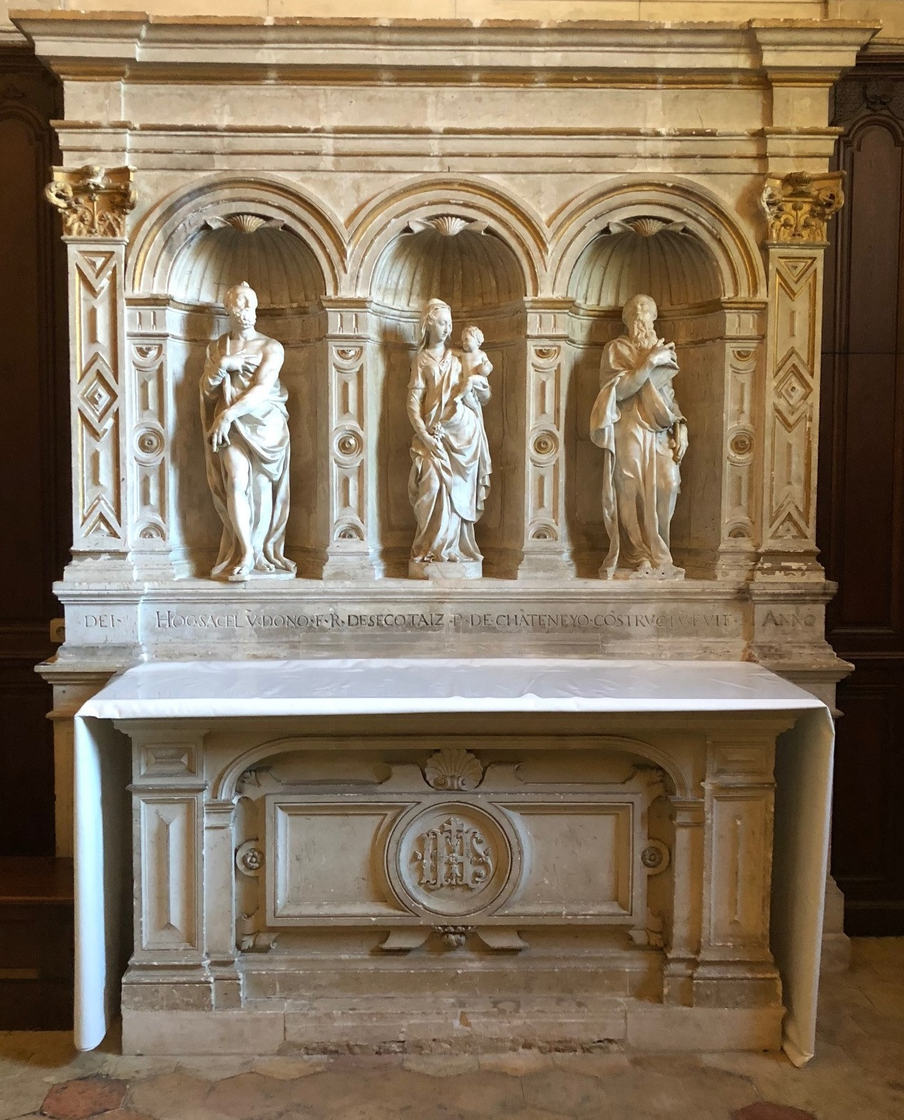 Retable de la chapelle des fonts baptismaux de l'église Notre Dame de la Couture